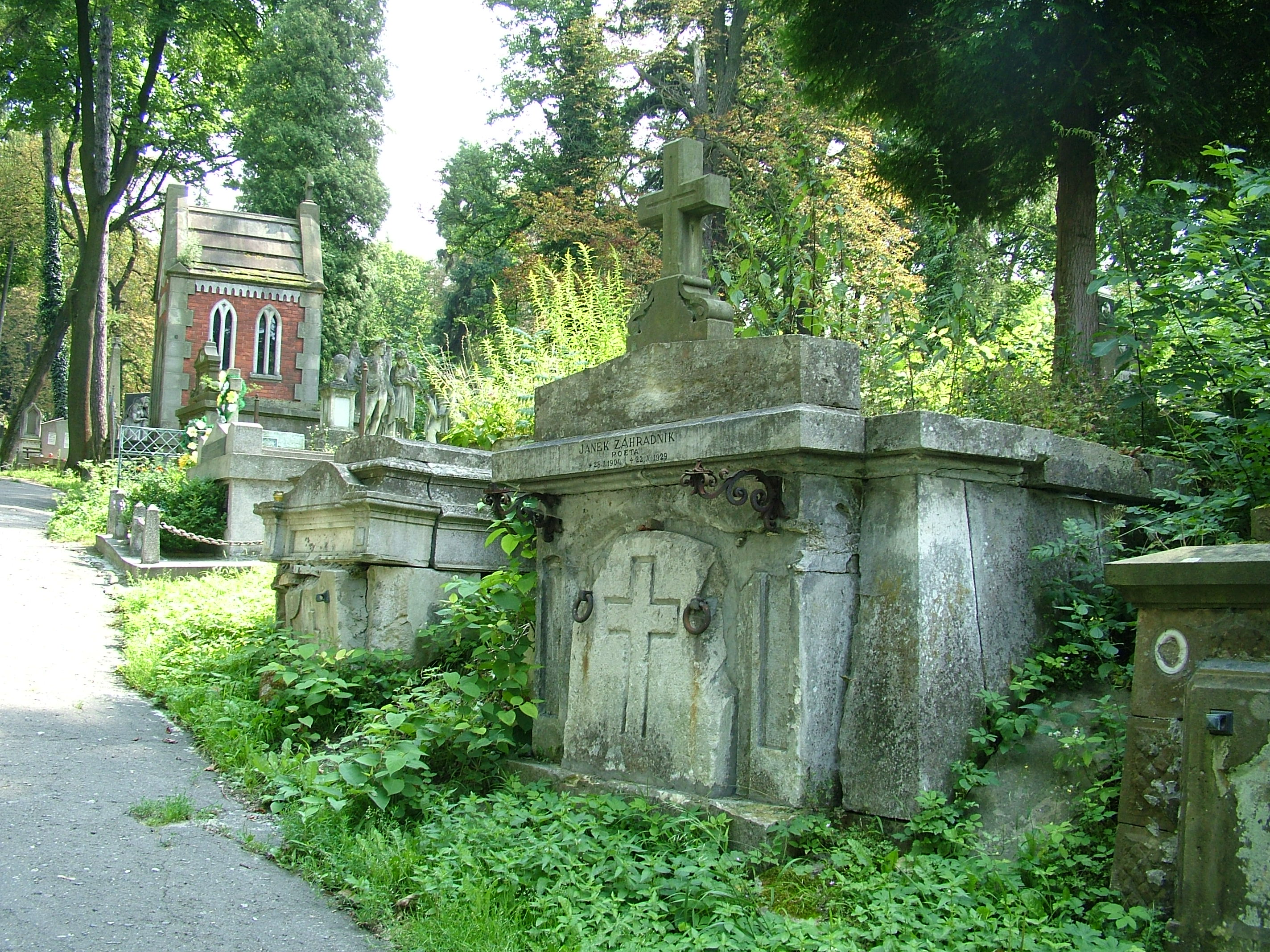 Grób Jana Zahradnika na cmentarzu Łyczakowskim. Sierpień 2007. Fot. Stanisław Kosiedowski.